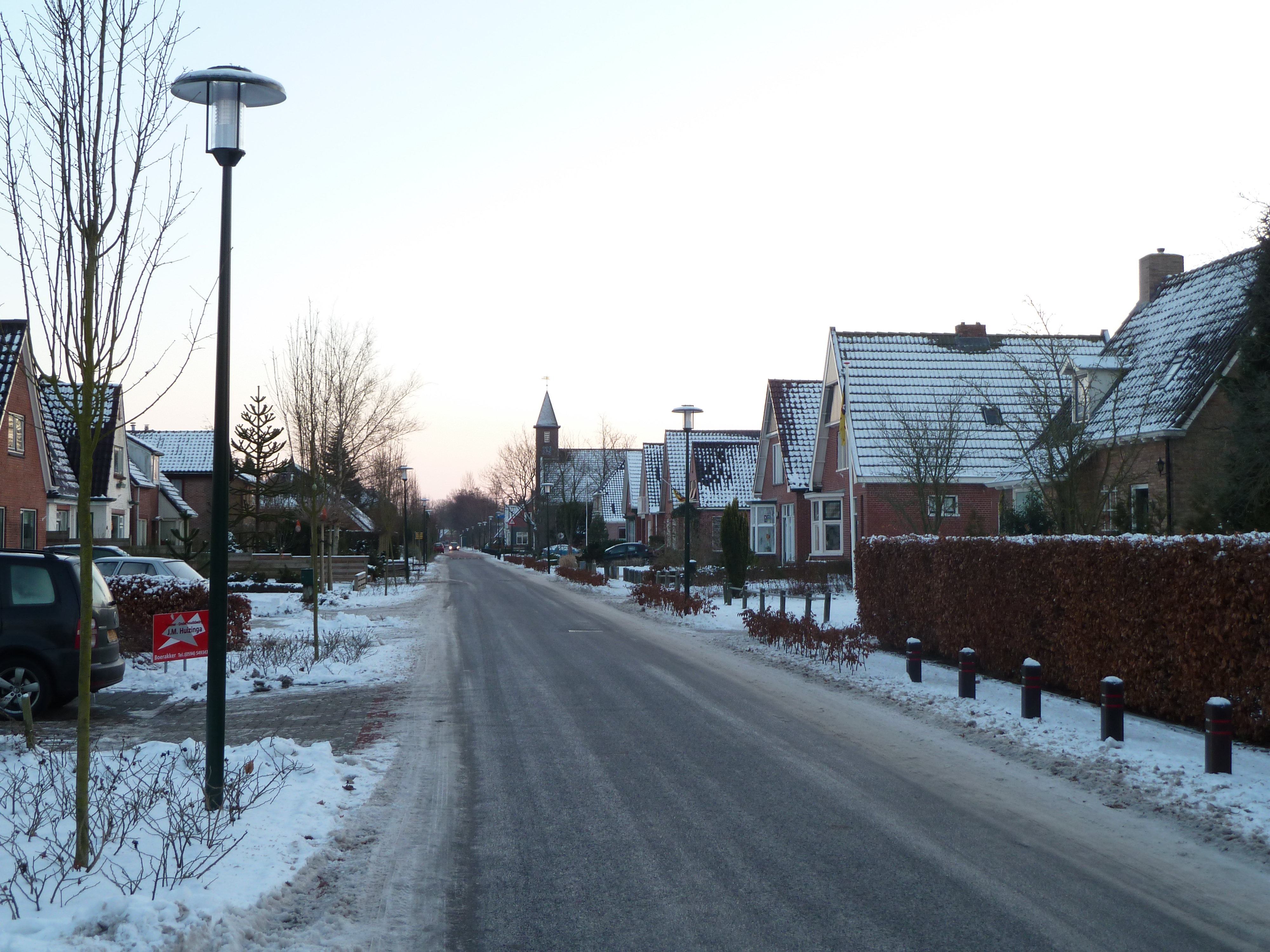 Gezicht op de Hoofdweg van Boerakker in de winter